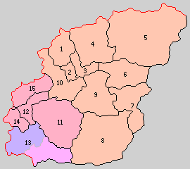 愛媛県上浮穴郡の町村制時点の町村。